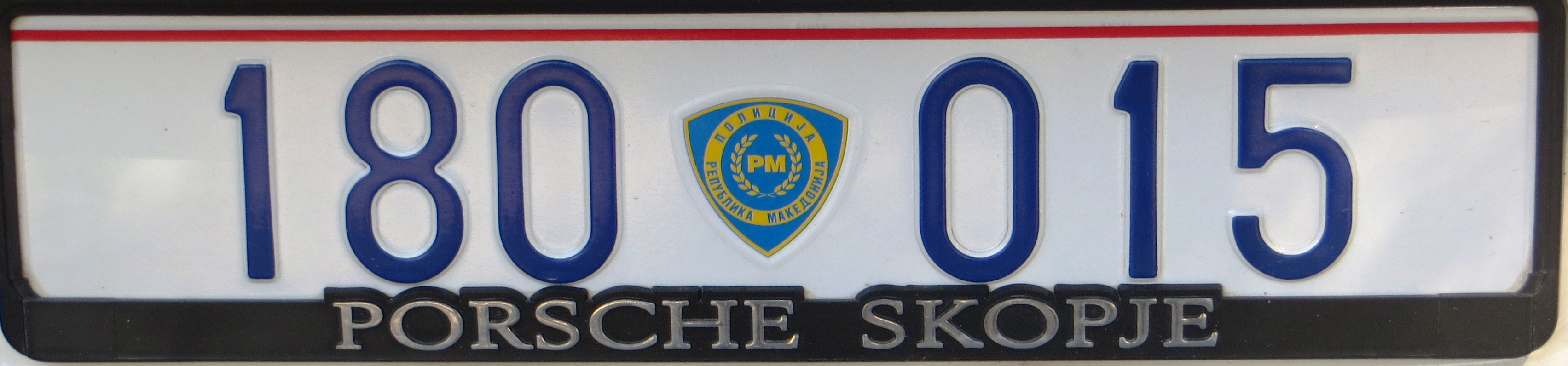 Politie kentekenplaat Macedonië